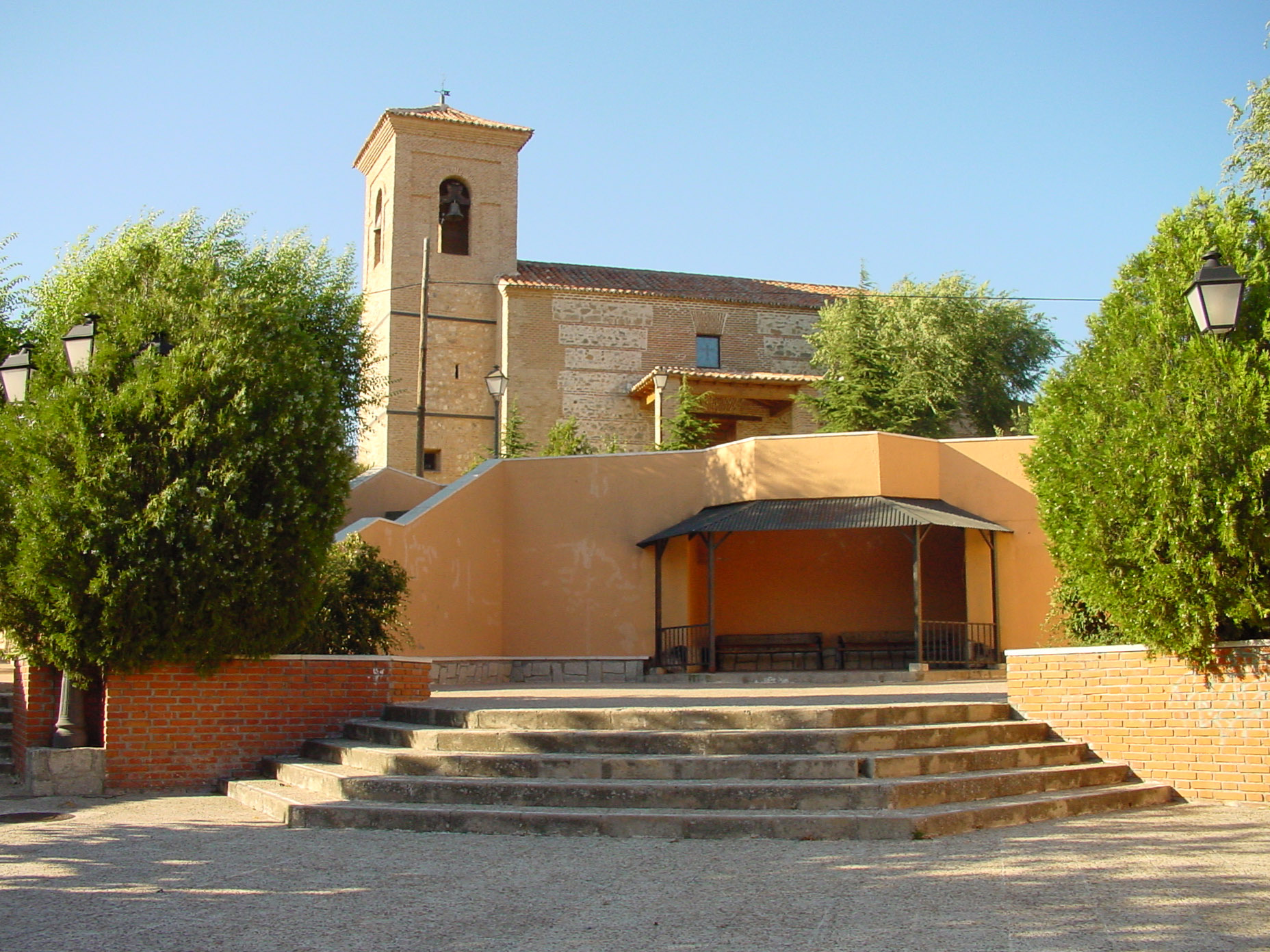 Iglesia, campanario y plaza en Batres.